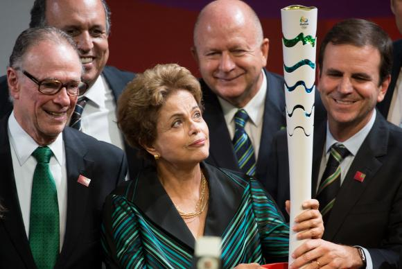 A presidente Dilma Rousseff, entre o governador Luiz Fernando Pezão, o prefeito Eduardo Paes e representantes do Comitê Organizador Rio 2016 na solenidade de divulgação da tocha olímpica